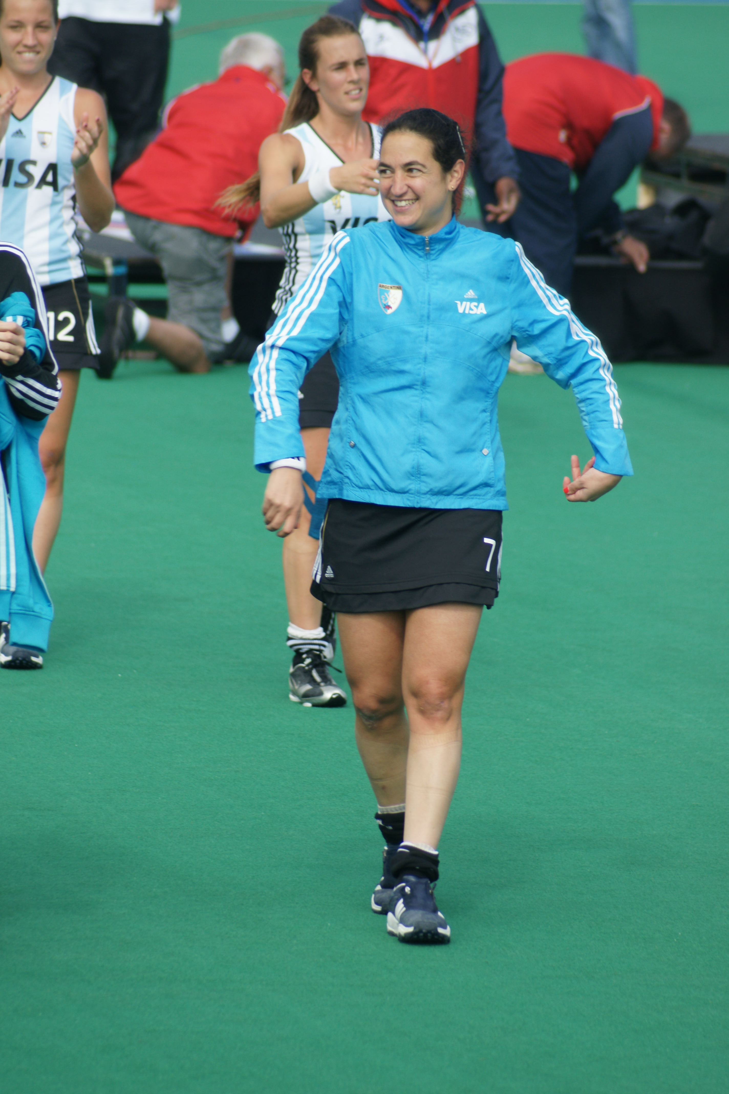 Alejandra Gulla